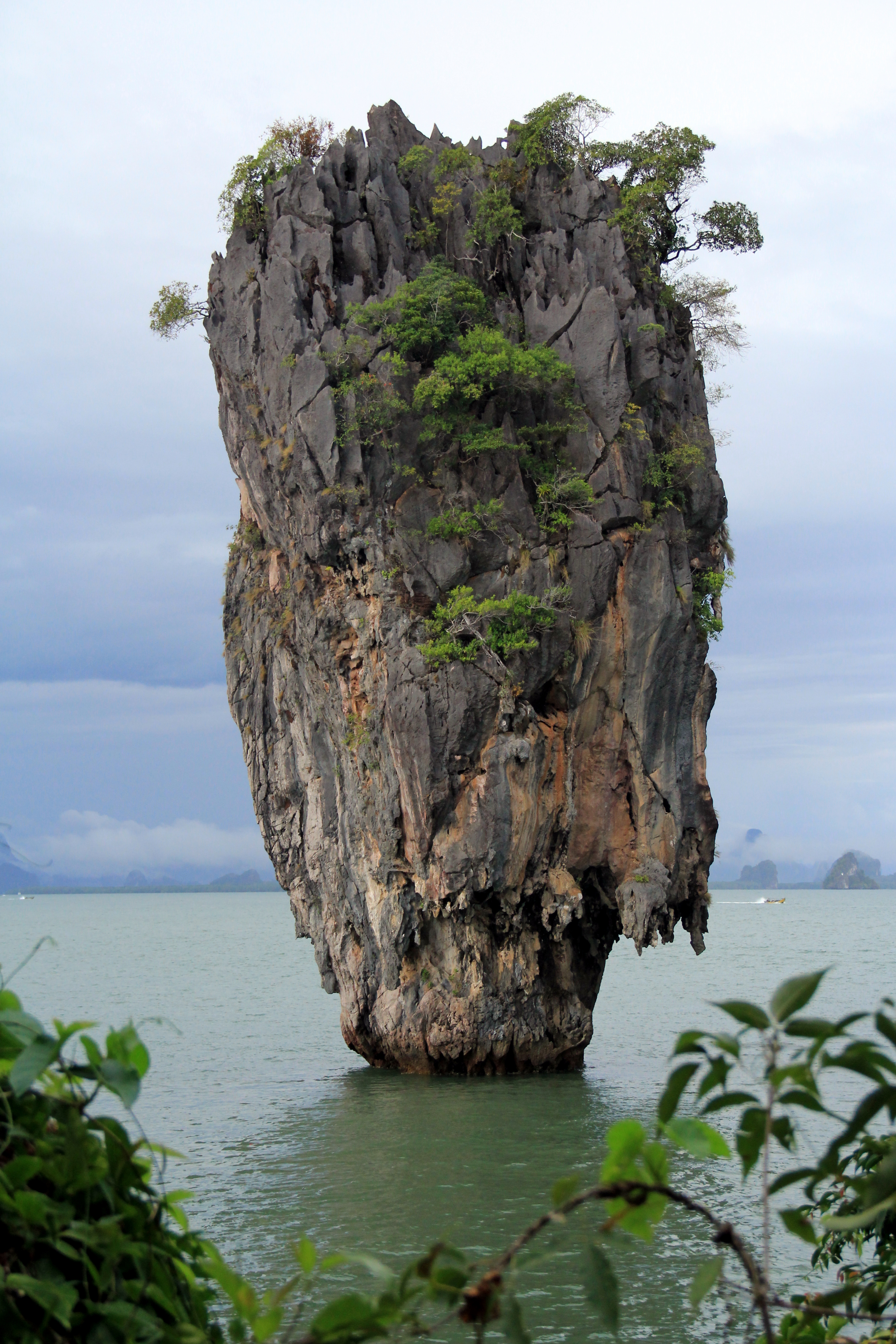 Koh Tapu Adası, Phang Nga Körfezi, Ao Phang Nga National Park, Tayland